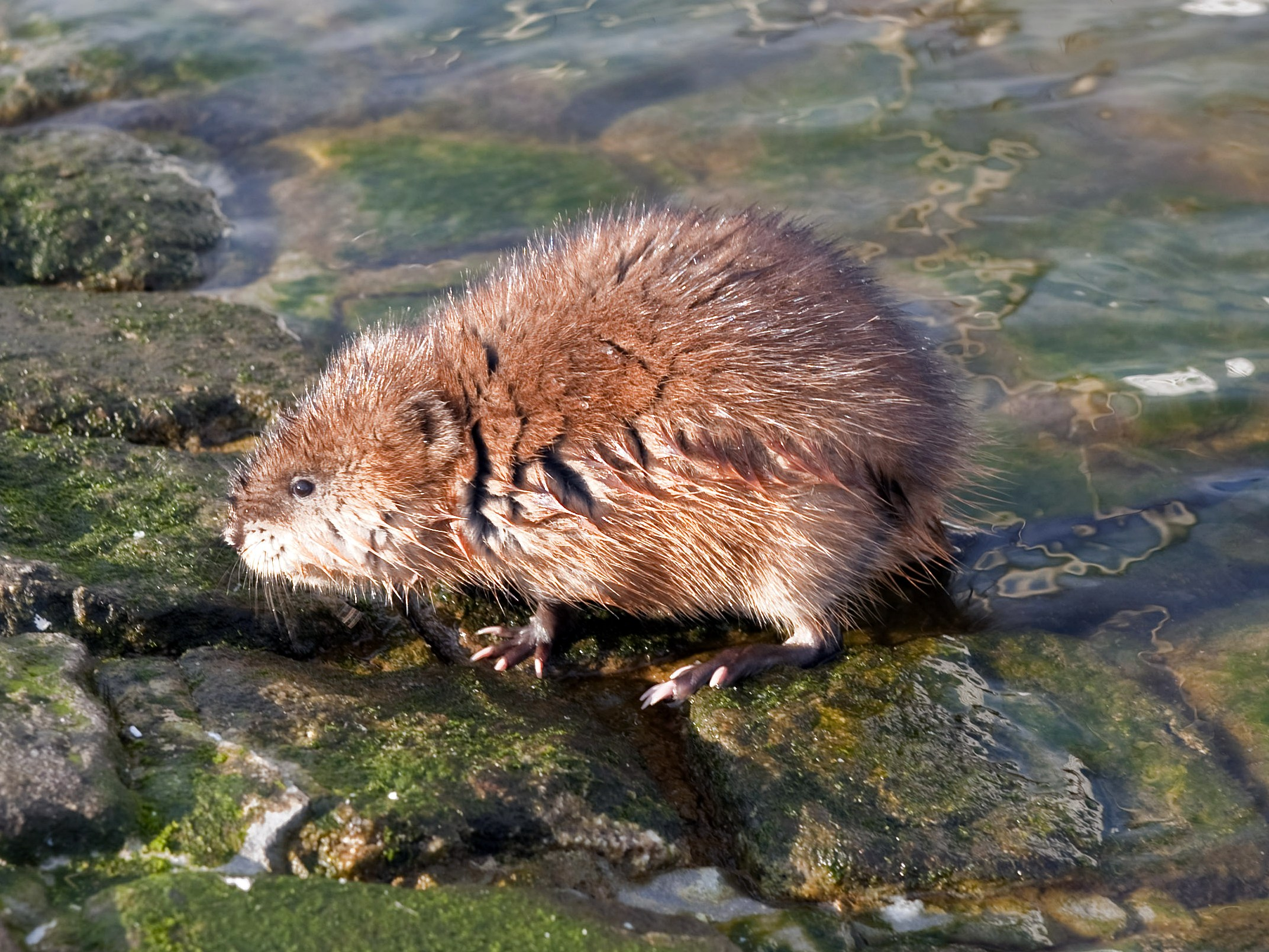 Muskrat